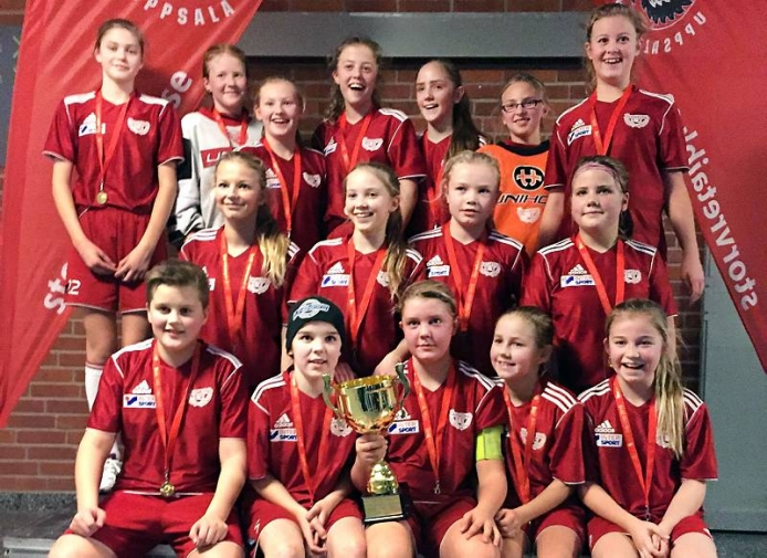 A Floorball team who burns for floorball.